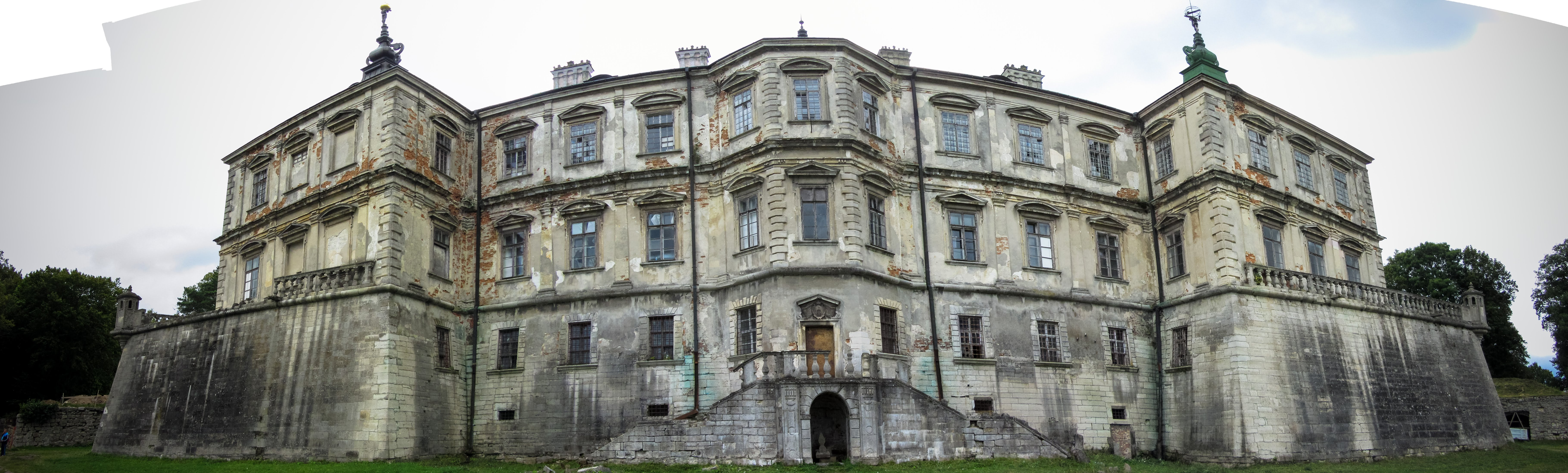 Панорама Підгорецького щамку у 2017 році